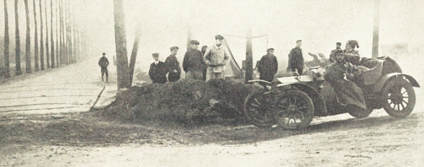 Georges Sizaire vainqueur de la première Coupe des Voiturettes, durant l'hiver 1906, ici au virage de Saint-Arnould en forêt de Rambouillet sous un semi-brouillard (La Vie au Grand Air du 17 novembre 1906, p.831).